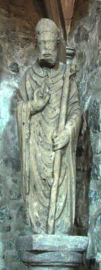 Statue de Saint Domitien (du Bugey), Saint-Rambert-en-Bugey